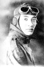 Retrato do aviador cearense de Camocim Euclydes Pinto Martins